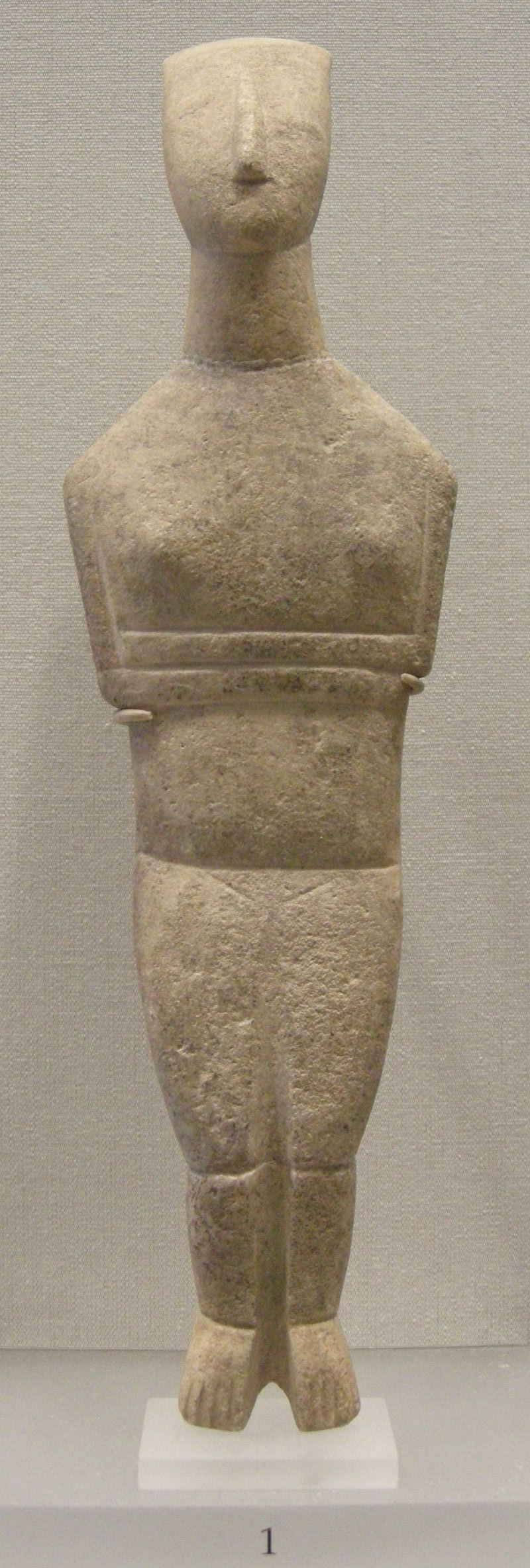 Arte greca, figurina cicladica, 2500 a.c.